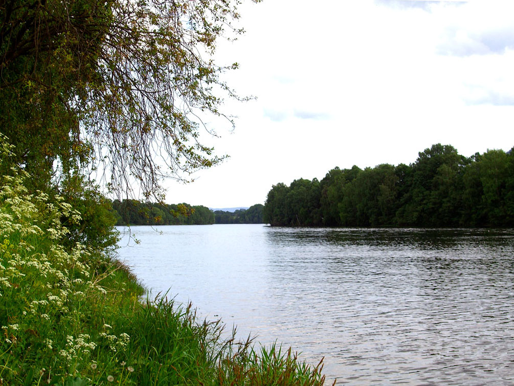 The Drammenselva River in Solbergelva, Norway